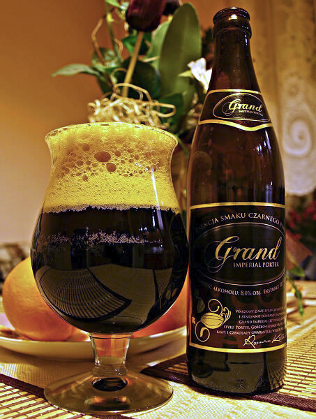 Piwo Grand Imperial Porter z browaru Amber